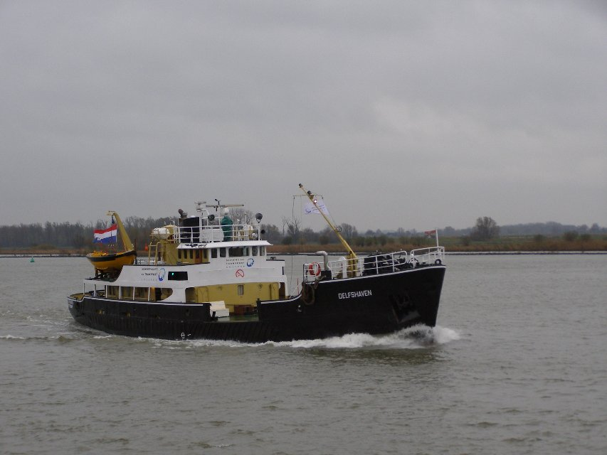 De Delfshaven